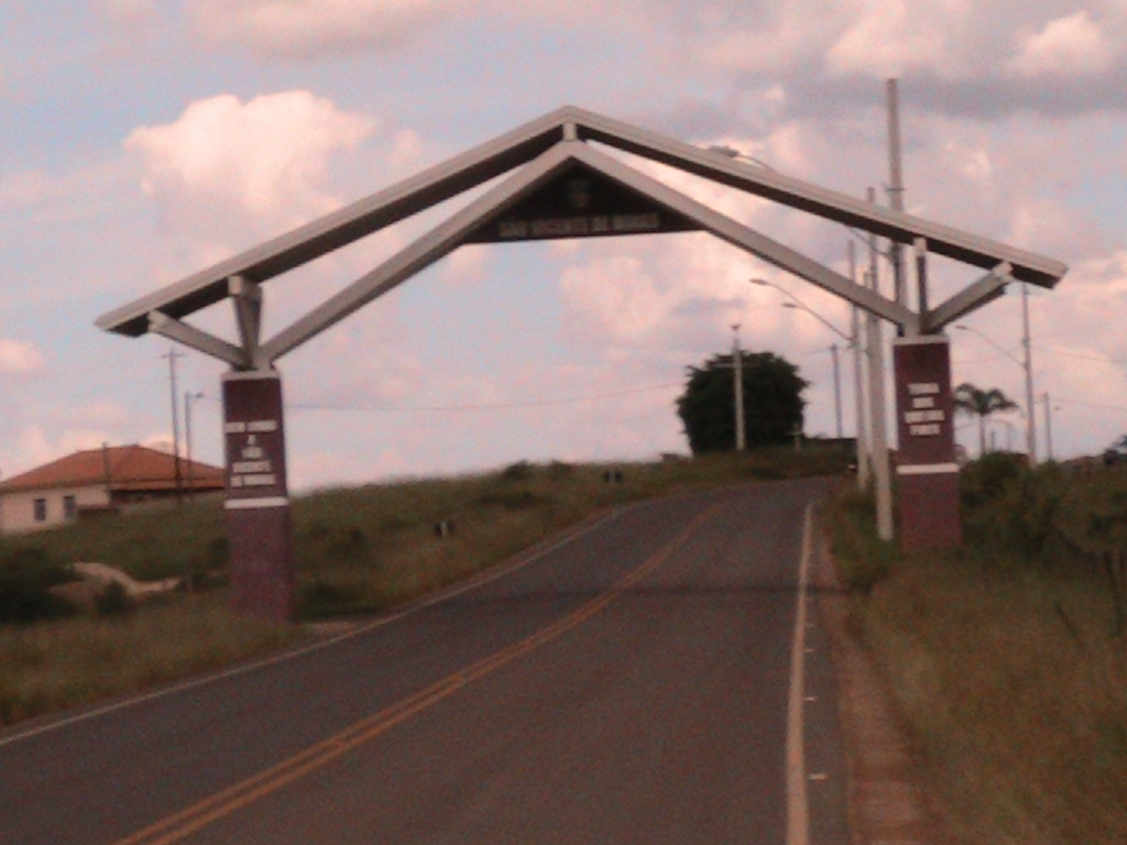 Portal de São Vicente de Minas, Minas Gerais, Brasil.